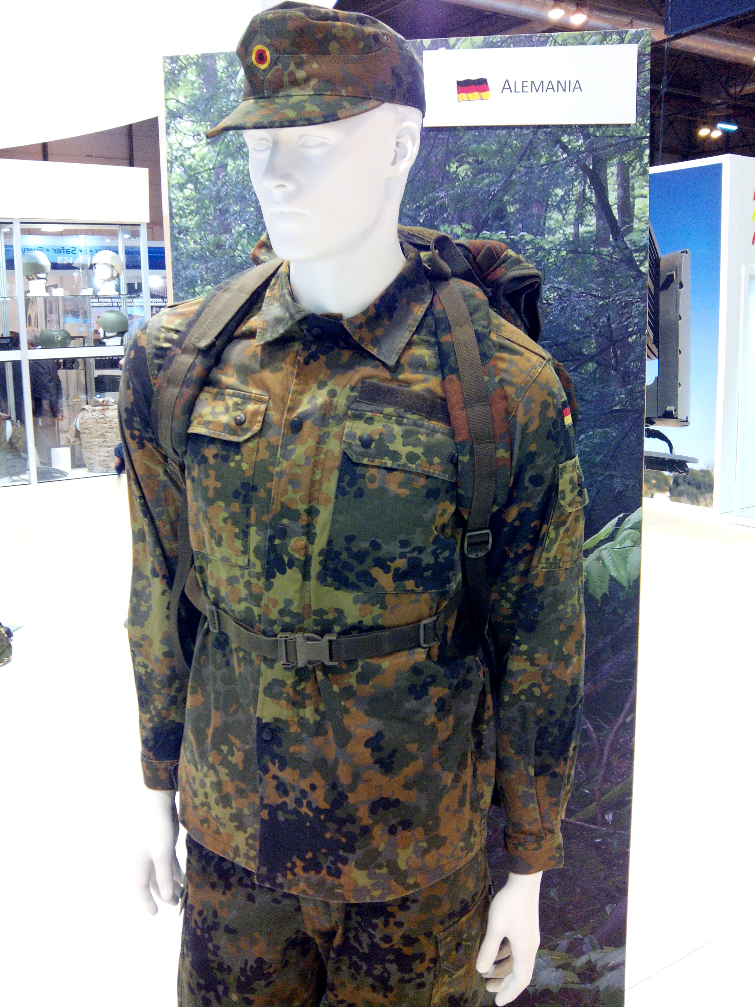 Uniforme militar, ejército alemán.